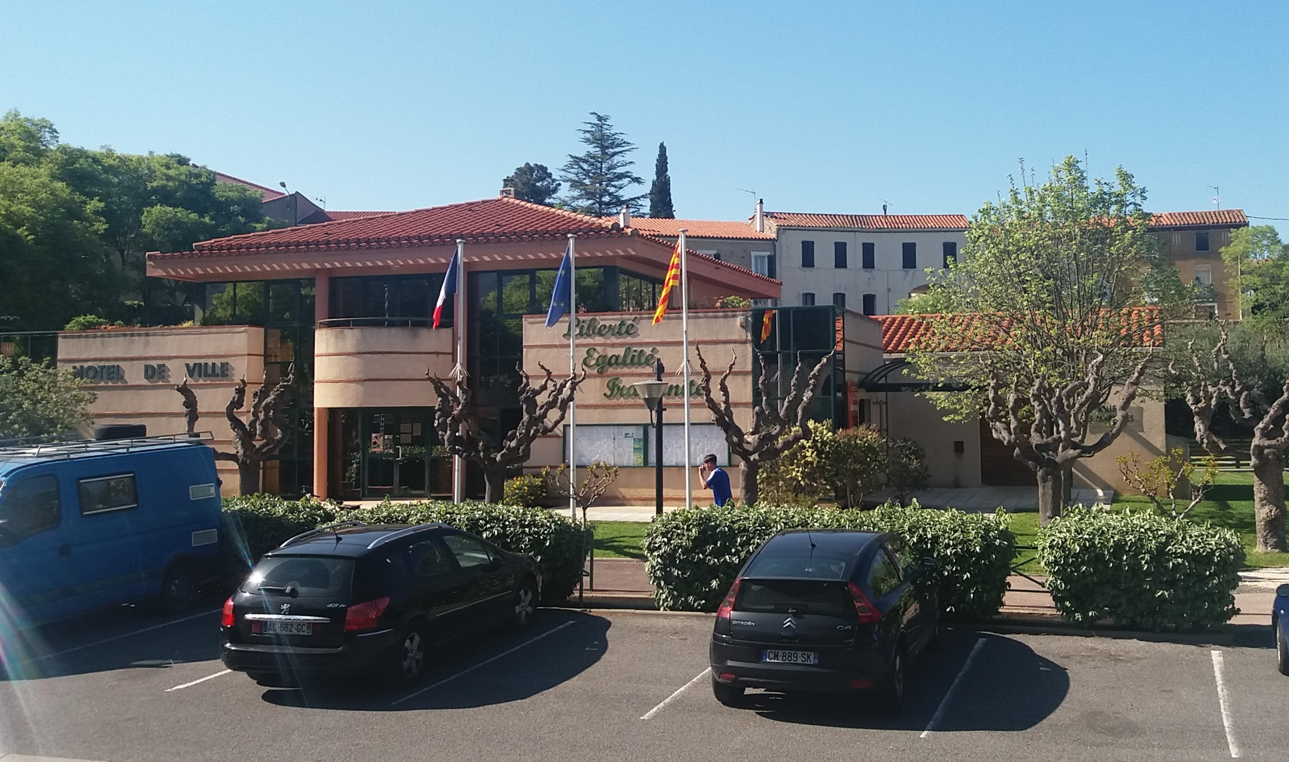 La Casa del Comú de Sureda